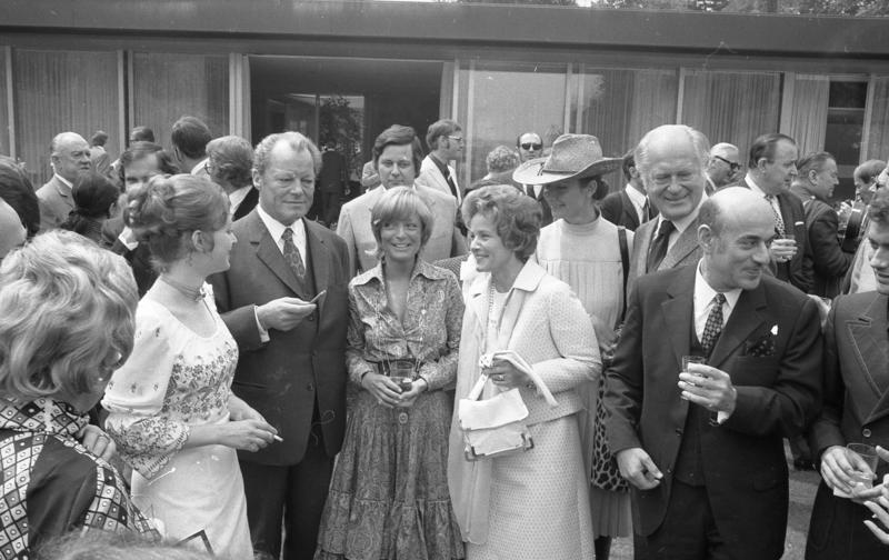 Bundeskanzler Willy Brandt empfängt Filmschauspieler